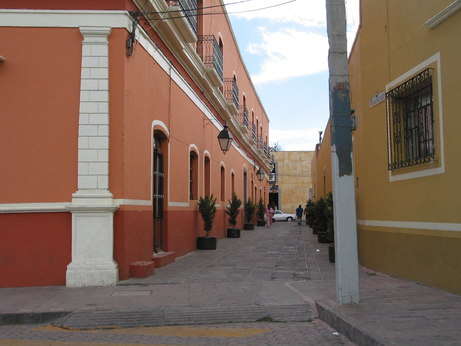 Calle, Huamantla, Tlaxcala/ Street, Tlaxcala